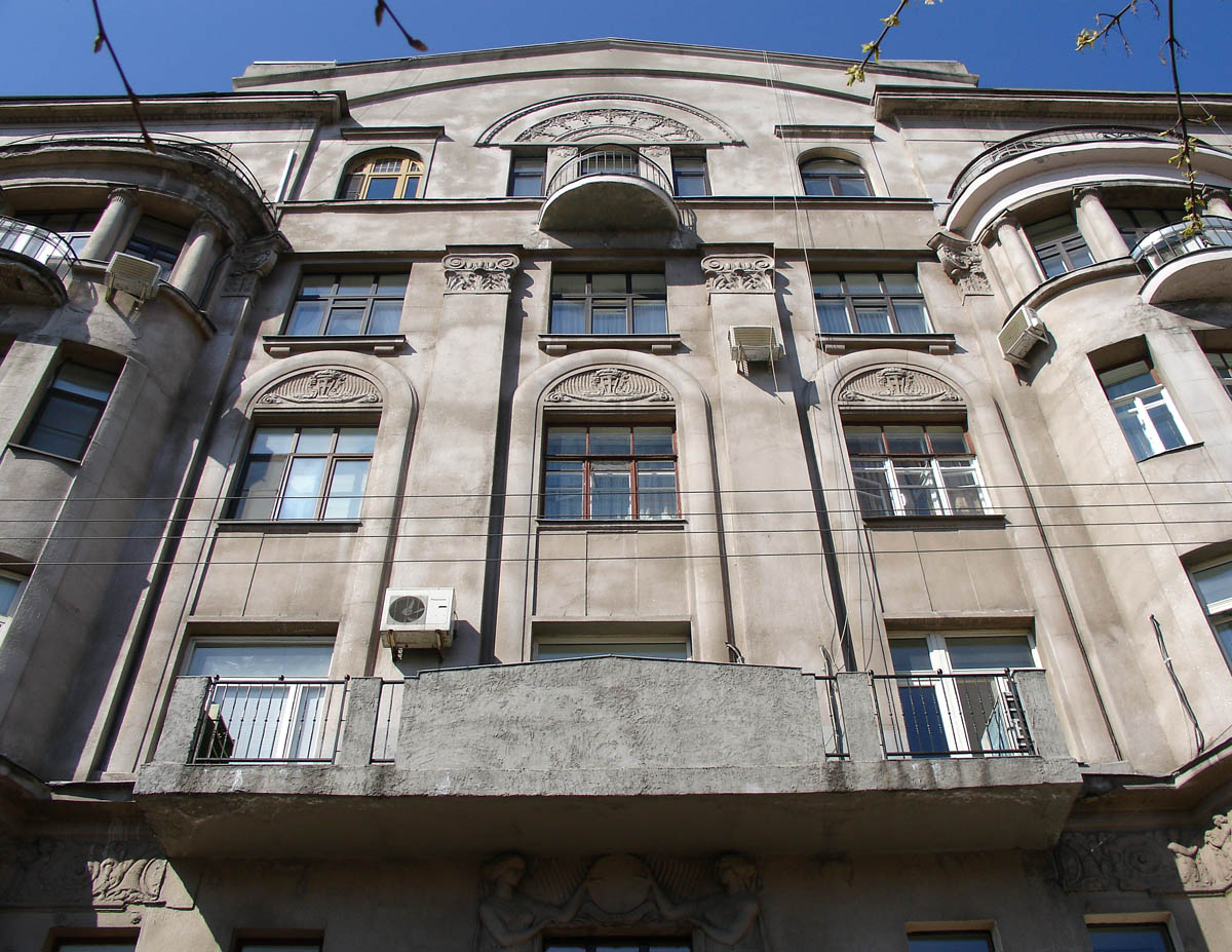 7, Arkhangelsky Lane, Moscow // Архангельский переулок, 7, Москва